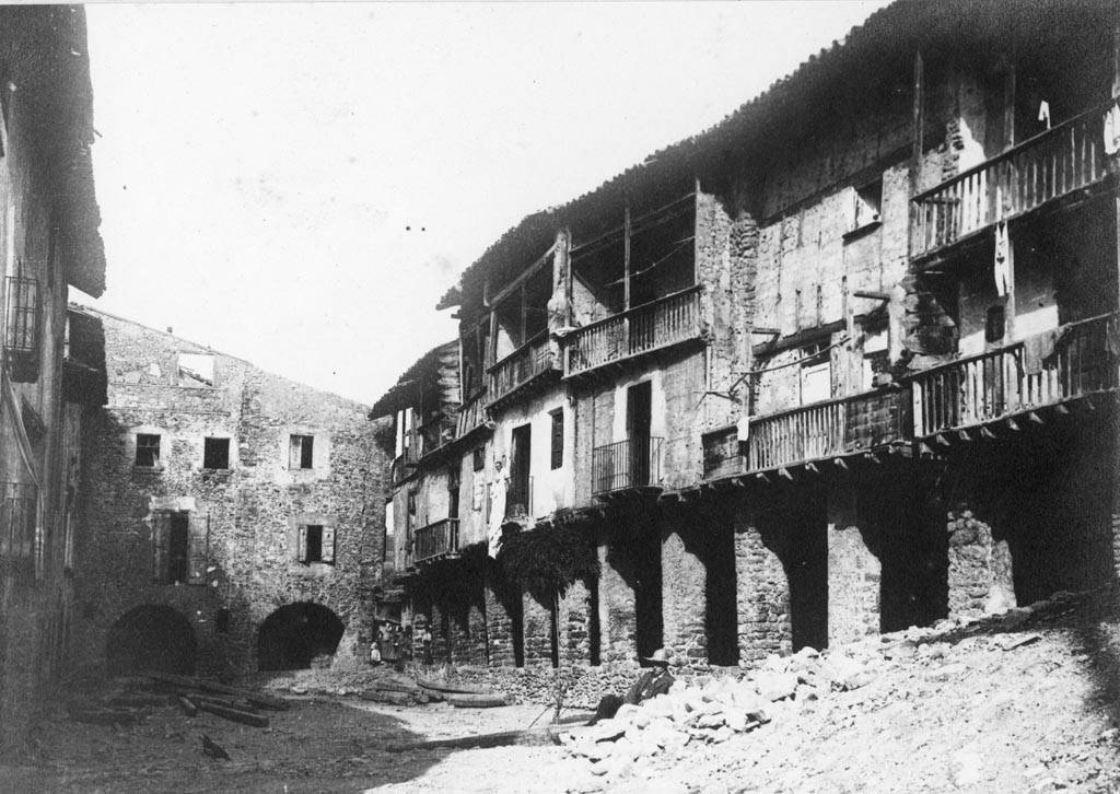 Plaça porxada de Bagà. Cèsar August Torras i Ferreri (Entre 1890 i 1923)